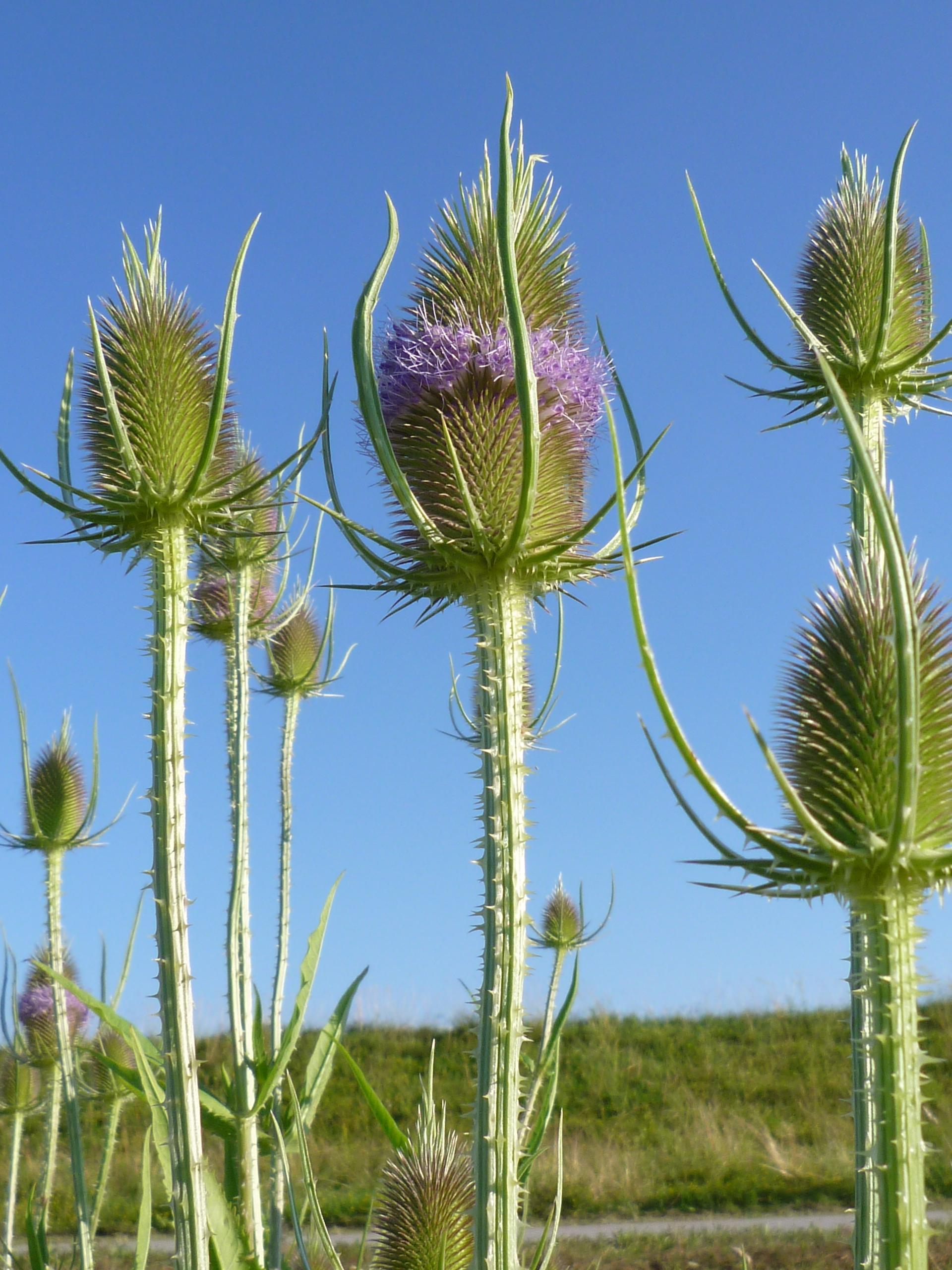 Blühende Wilde Karde. Die Aufnahme wurde entlang des Donau-Radweges zwischen Straubing und Bogen gemacht.